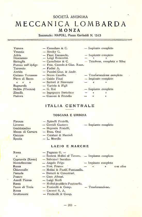 Società Anonima Meccanica Lombarda - Elenco dei molini eseguiti in Italia e all'estero pag. 203